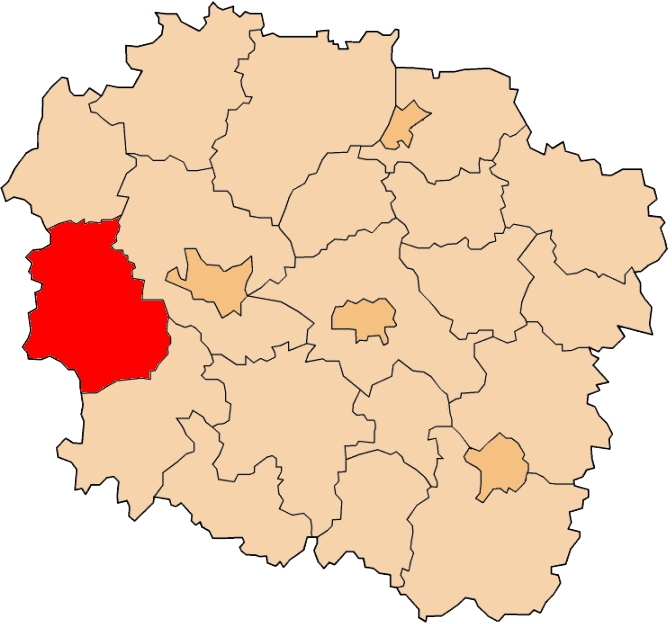 Powiat nakielski na mapie województwa kujawsko-pomorskiego.